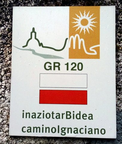 Hinweisschild am Ignatiusweg